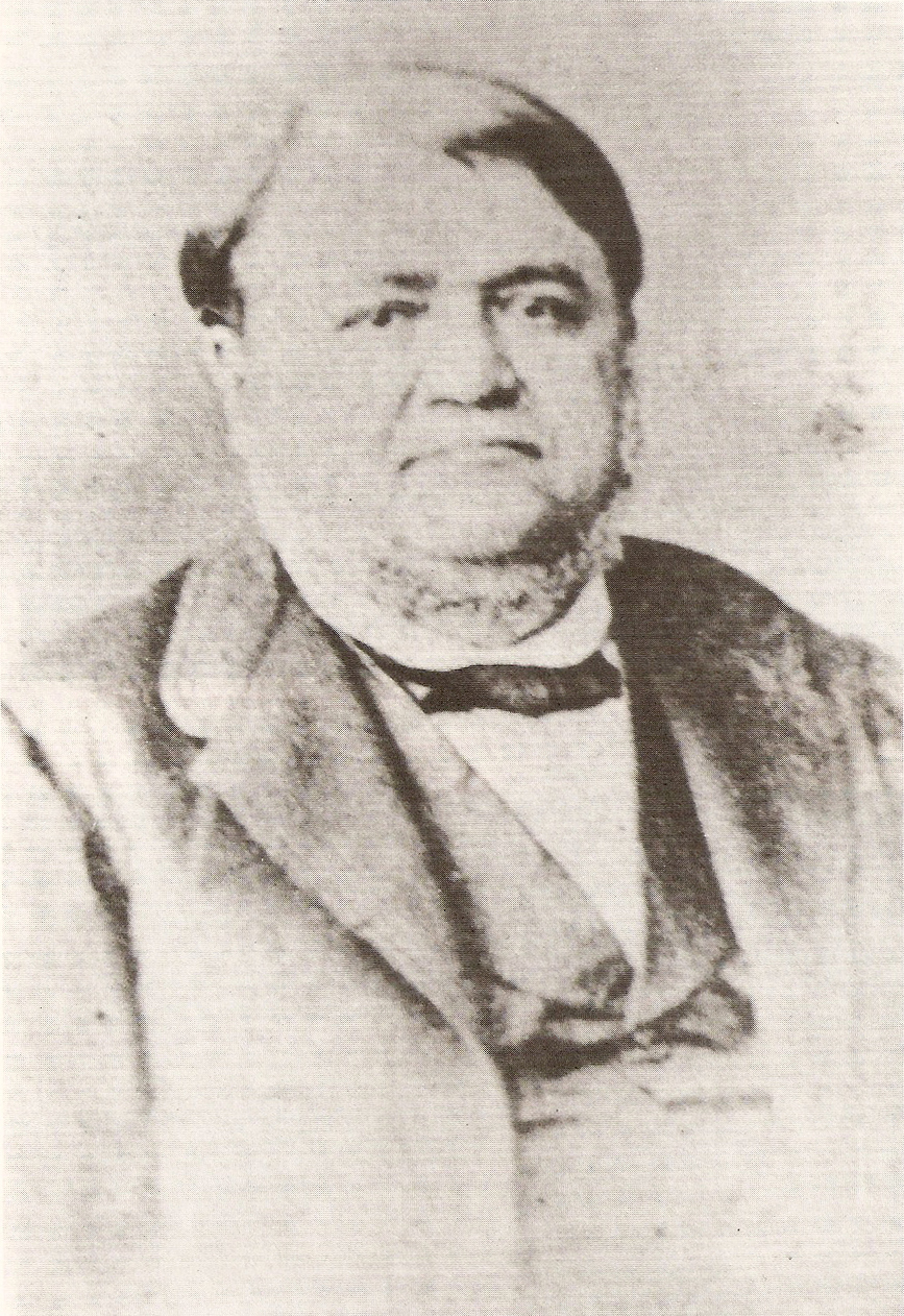 Foto de Augusto Teixeira de Freitas em seus últimos dias.